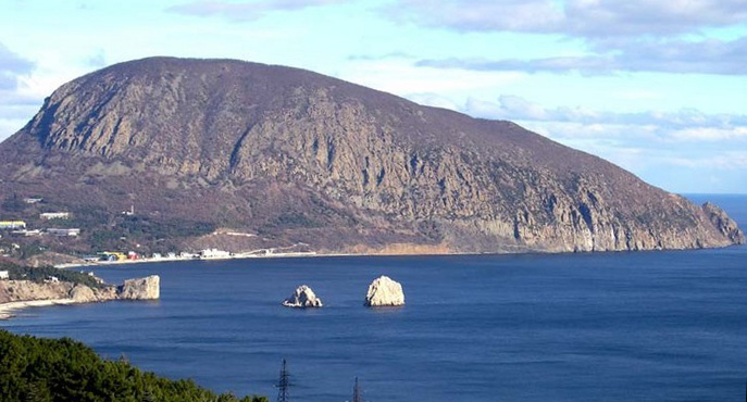 Медведь-гора, АюДаг